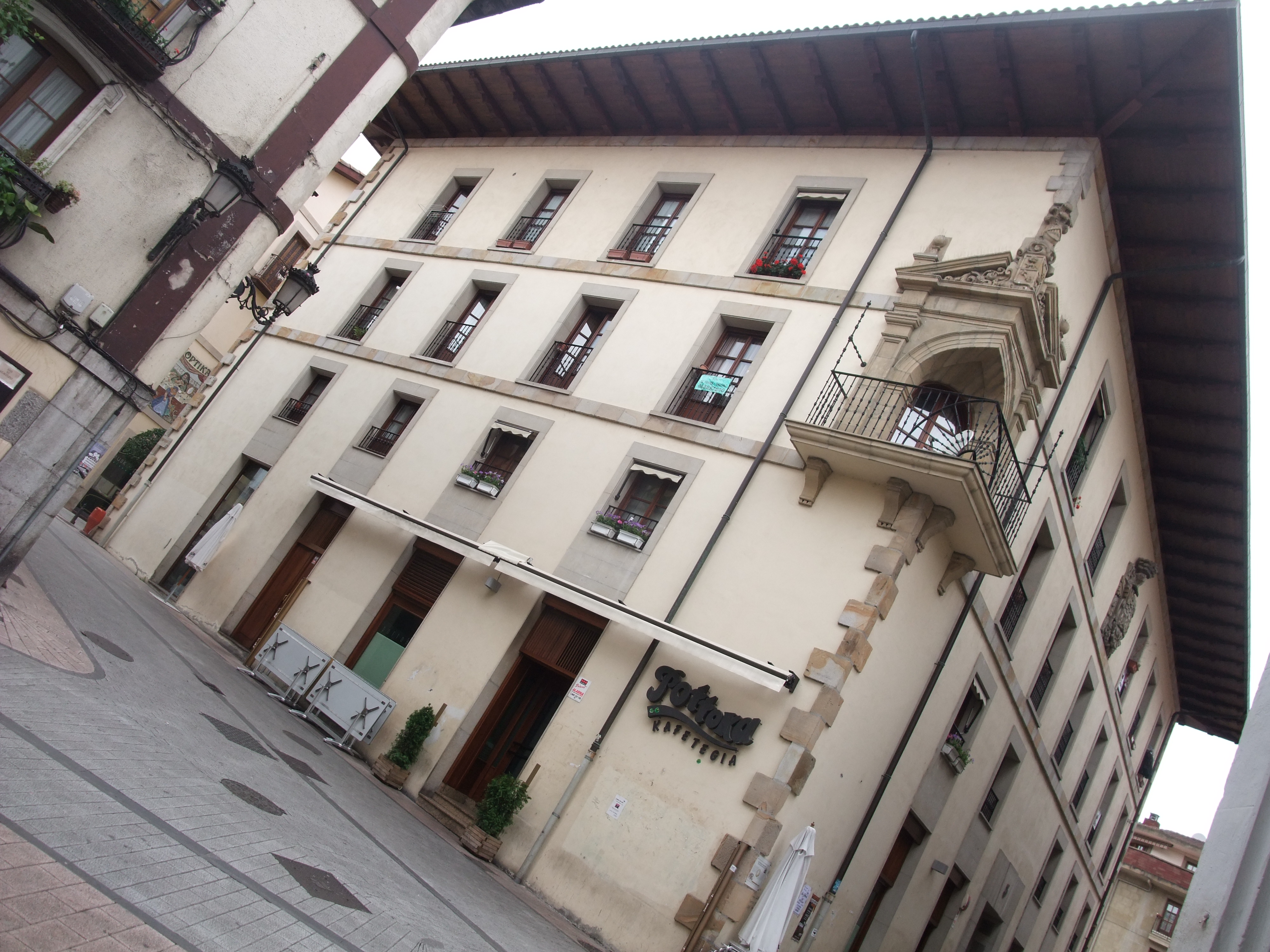 Ordizia (Guipúzcoa)-Casa Gazteluzar-1